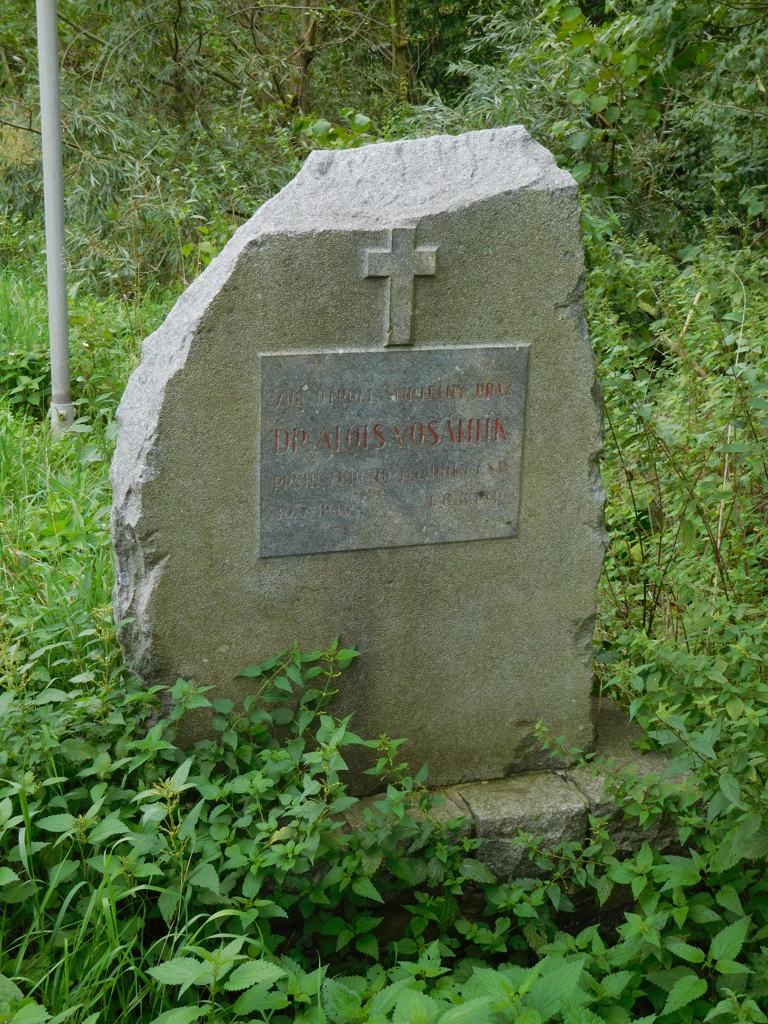 Horní Bousov - pamětní kámen A. Vošahlíka